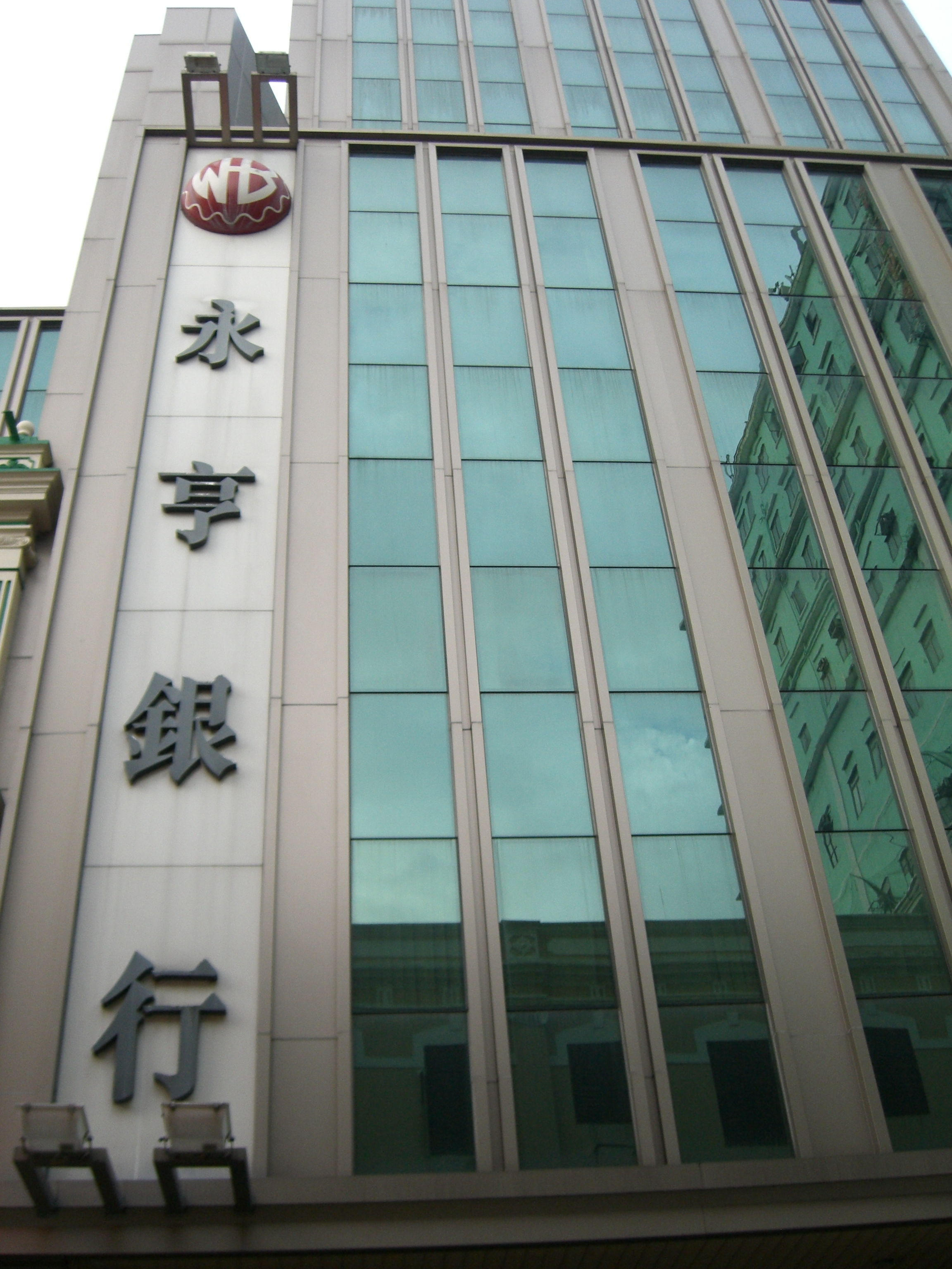 Macau Banco Weng Hang Building